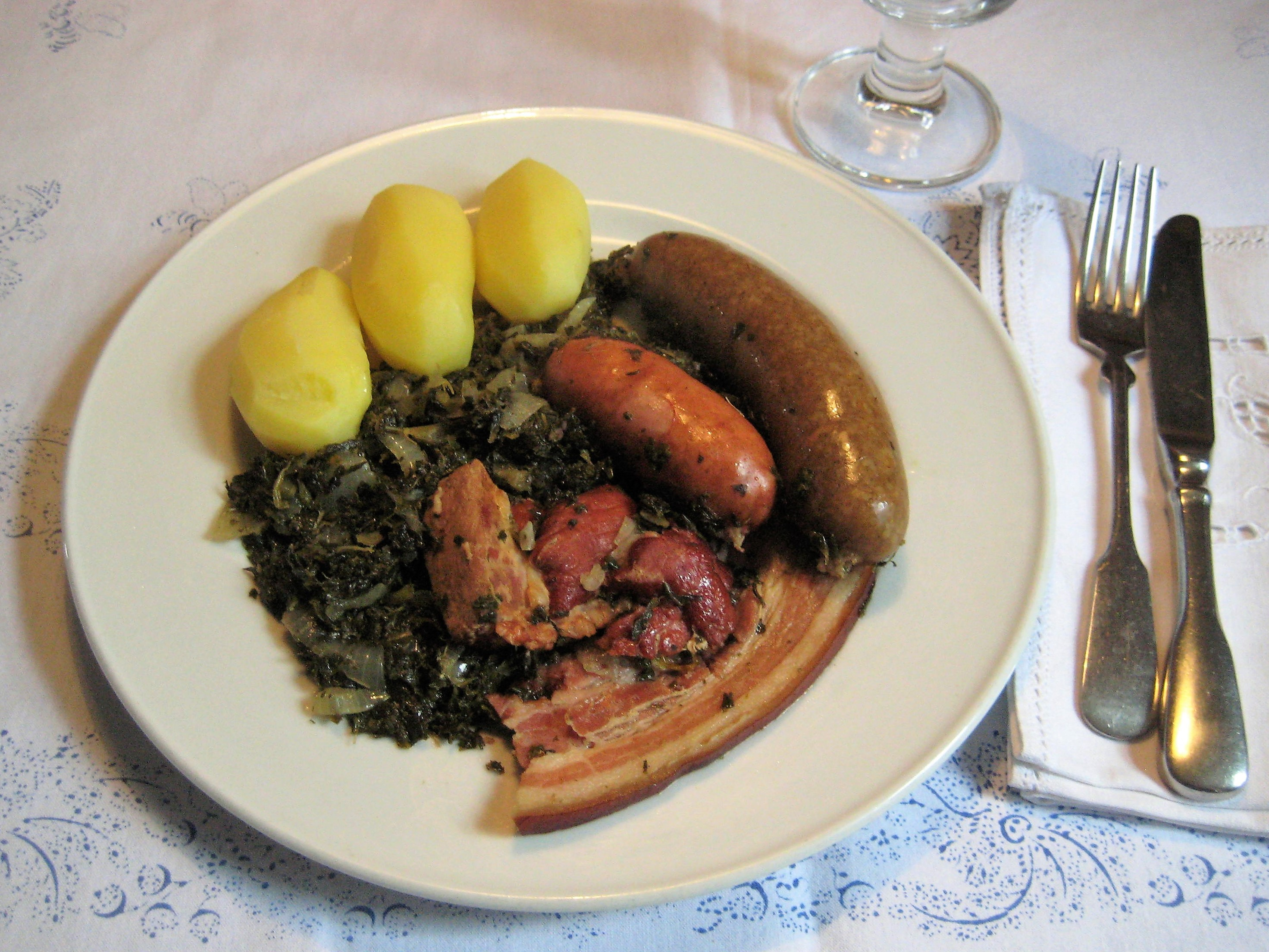 Ein Teller Braunkohl und Pinkel (Grünkohl nach Bremer Art): Braunkohl, Bremer Pinkel, Kohlwurst (Schinkenkochwurst), Kassler, gestreifter Bauchspeck und Salzkartoffeln.